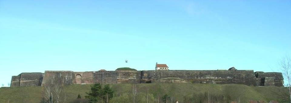 Bitche: Zitadelle